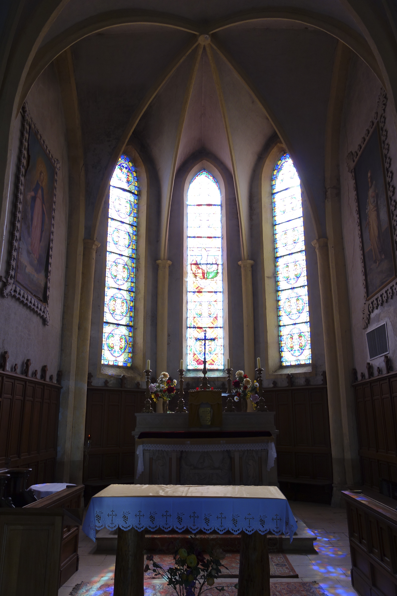 Nef de l'église de Saint Apollinaire